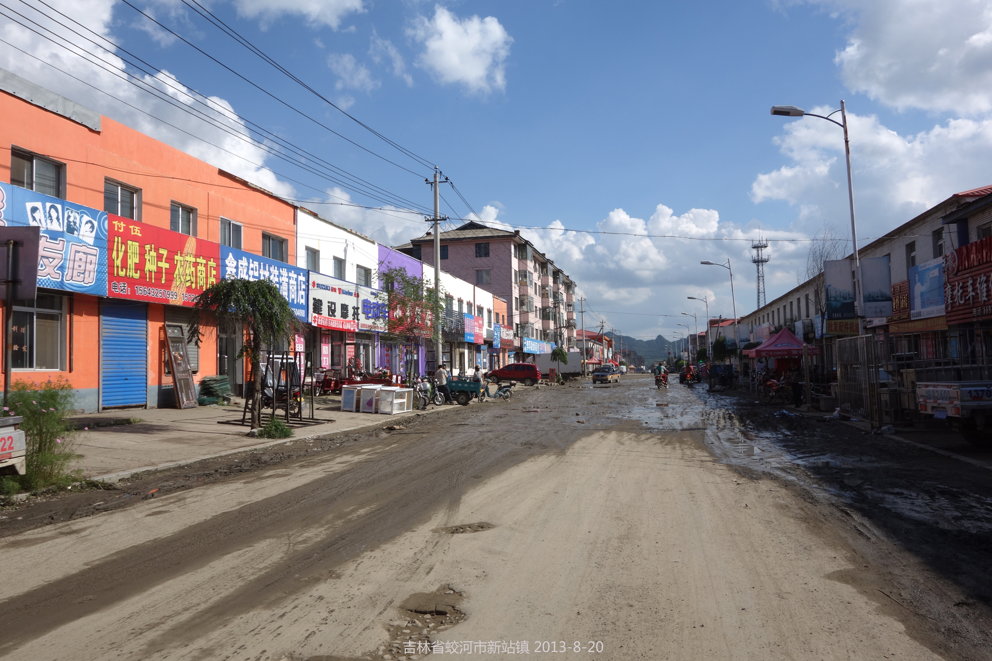 “水泥”大街